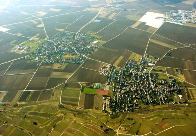 Luftbild von Oberrimsingen (Mitte links) und Niederrimsingen (vorn rechts), Stadt Breisach am Rhein, aufgenommen bei einer Ballonfahrt mit dem Ballonteam Norbert Blau